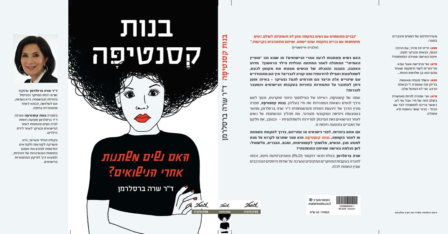 בנות קסנטיפה - האם נשים משתנות אחרי הנישואים? הוא ספר עיון בעברית מסוגת פסיכולוגיה, פמיניזם ומגדר, מאת דוקטור שרה ברסלרמן, שיצא לאור בהוצאת מטר בשנת 2017